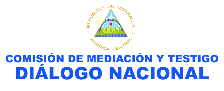 Esta imagen incluye otra